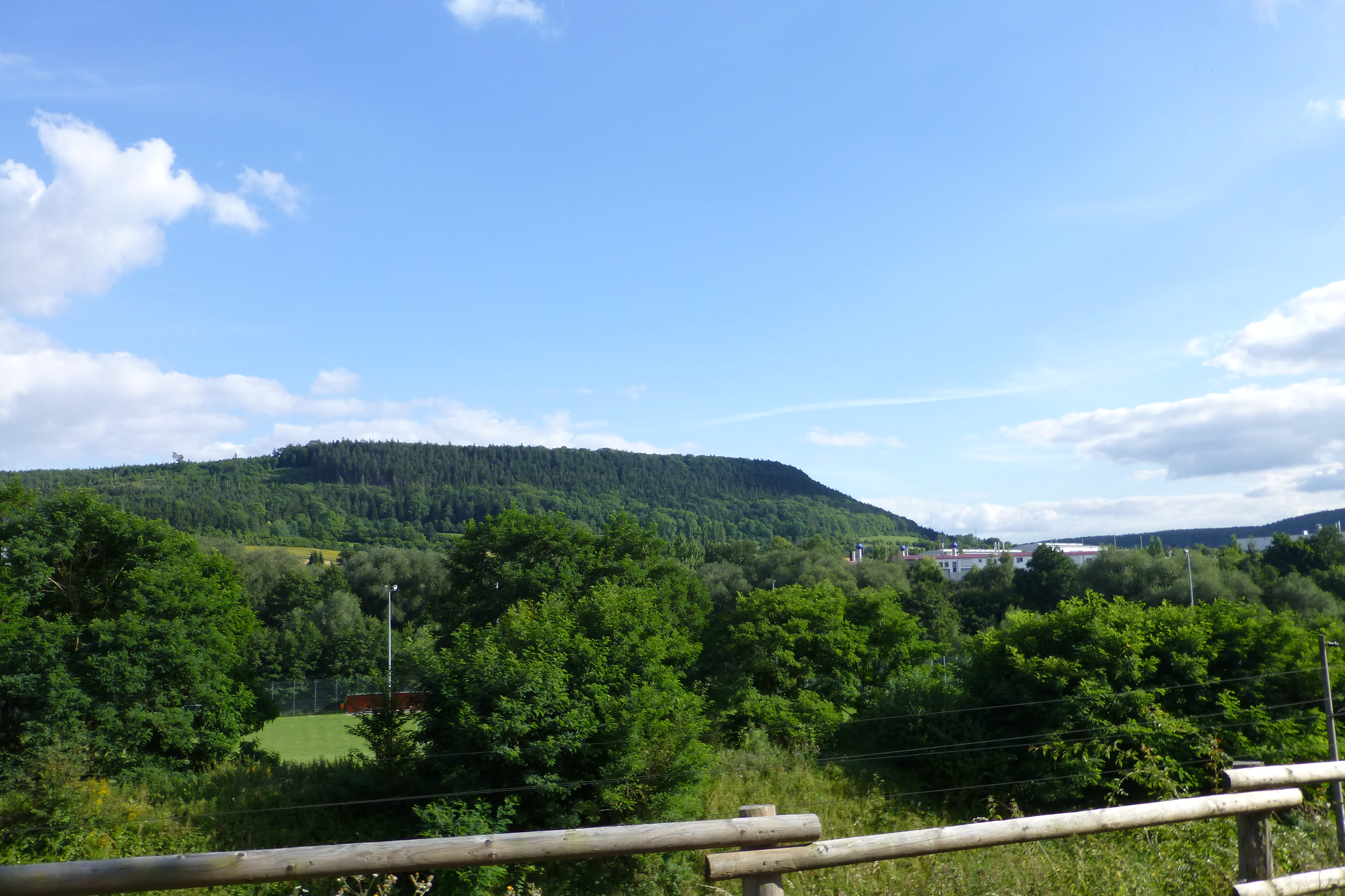 Blick über das Leinetal auf den Dün bei Heiligenstadt